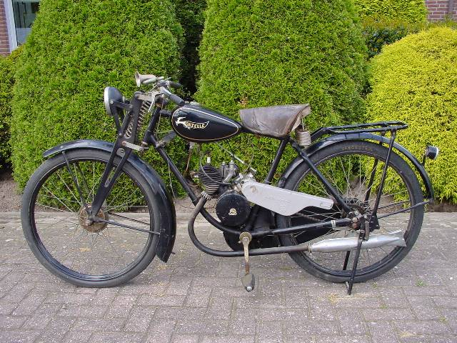 Toestemming van Yesterdays Antique Motorcycles (